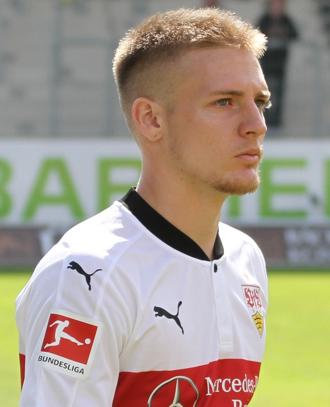 Santiago Ascacibar bei seinem ersten Einsatz für den VfB im Testspiel gegen Großaspach. Aufgenommen von